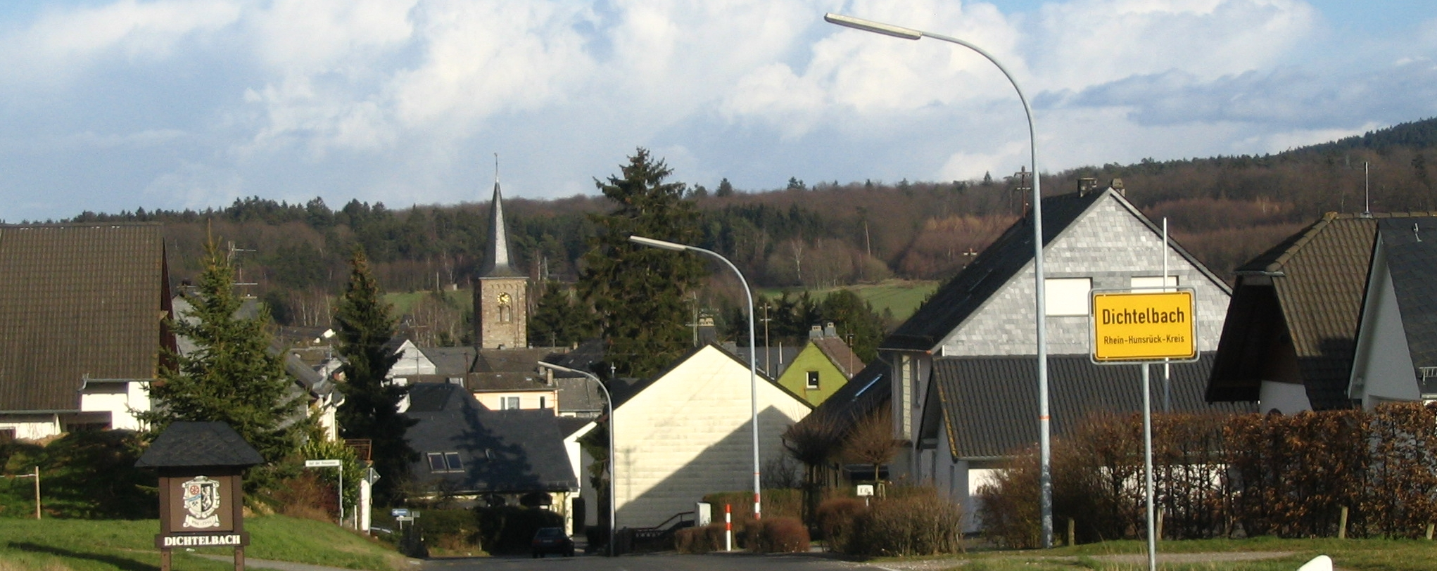 Dichetlbach im Hunsrück, Ortsansicht von Westen